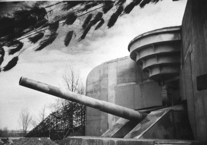 Schwerste deutsche Küstenbatterie in Bereitschaft. Aufnahme: OT-Kriegsberichter Maier